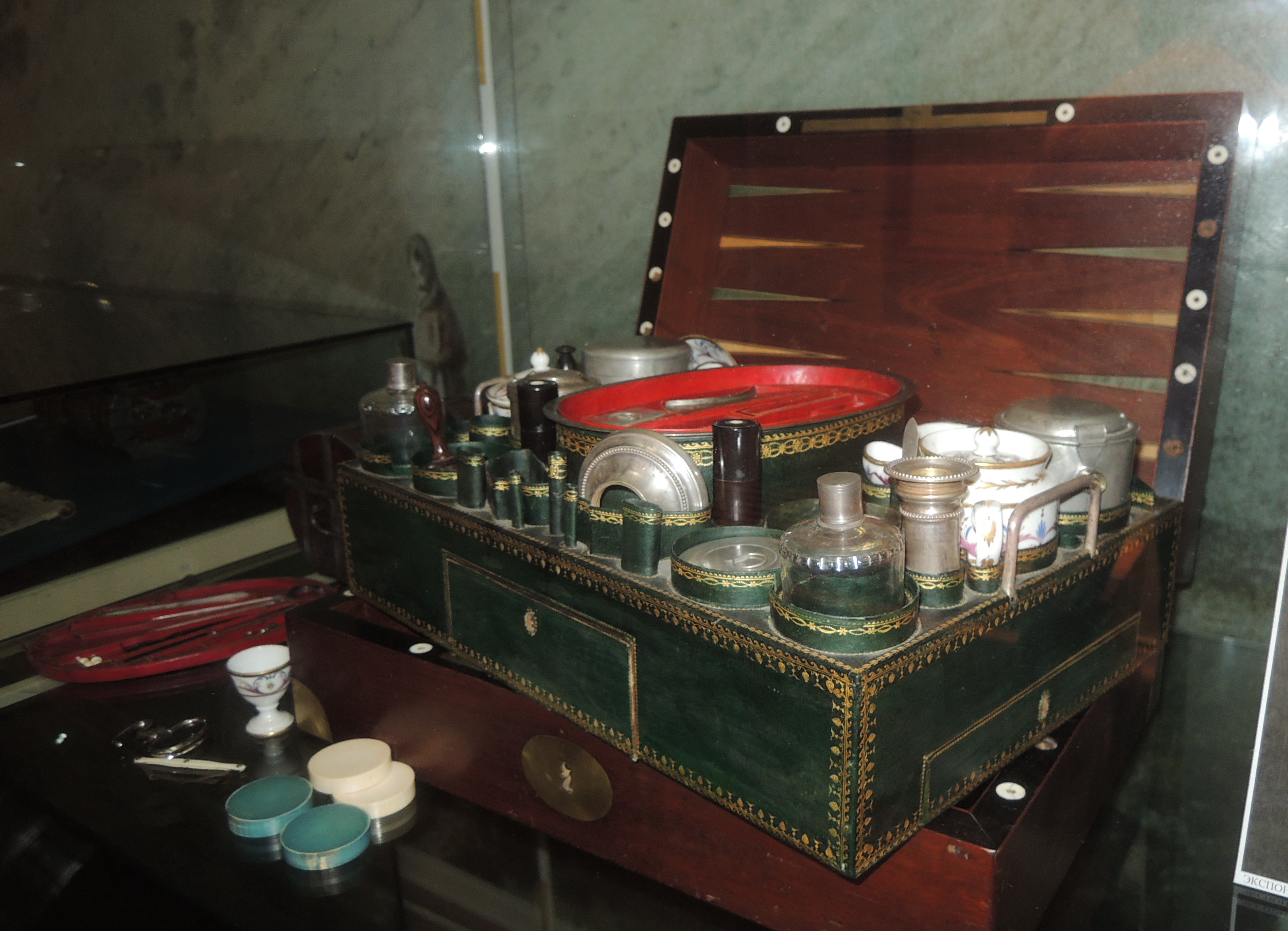 Погребец-нессесер дорожный с кухонной посудой, чайным прибором, туалетными принадлежностями, чернильницей, с писчей бумагой и перьями, комплектом игры "трик-трак", парой подсвечников, шоколадницей, баночками для сахара, туалетной ватой, ножичком, циркулем, сапожным крючком. Западная Европа, 1810-е. ГИМ